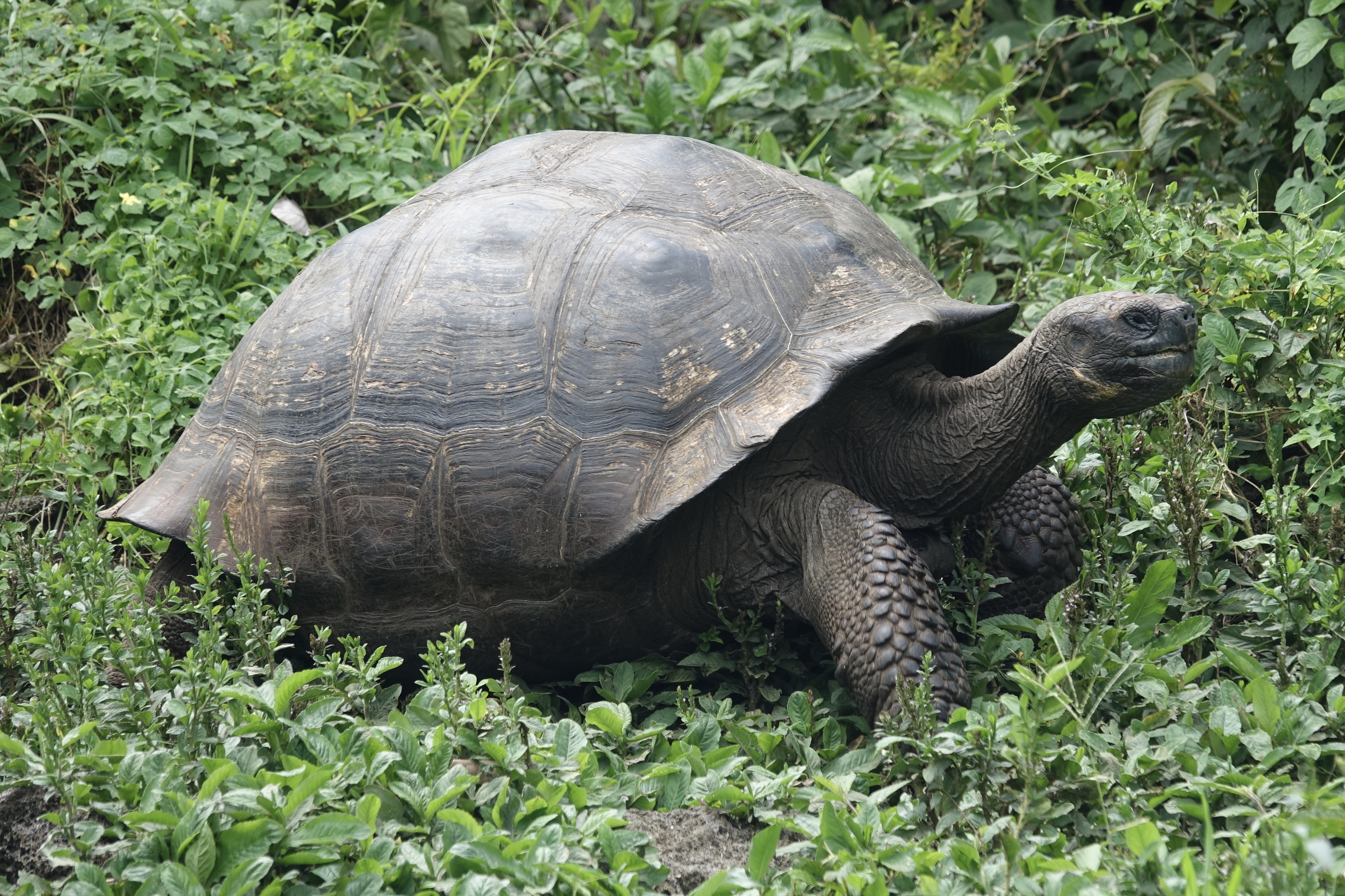 Galapagos Tortoise